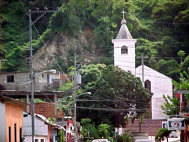 Chirimena pueblo costero de la región de barlovento en el estado Miranda - Venezuela (2000)